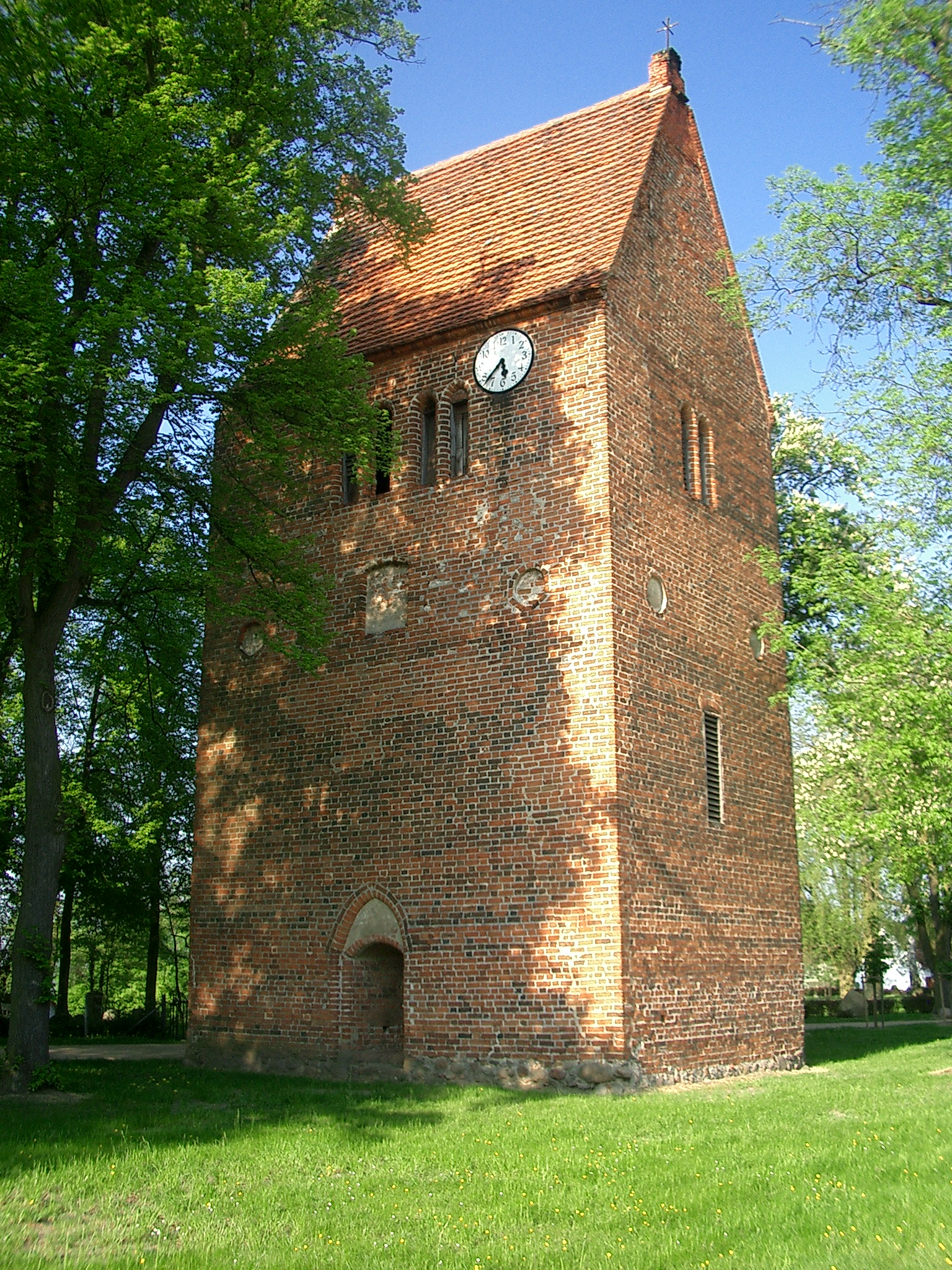 Klosteranlage Arendsee